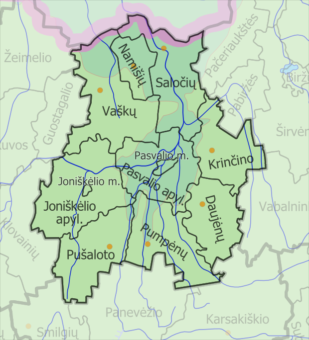 Padaryta iš :image:LietuvosSeniunijos.png